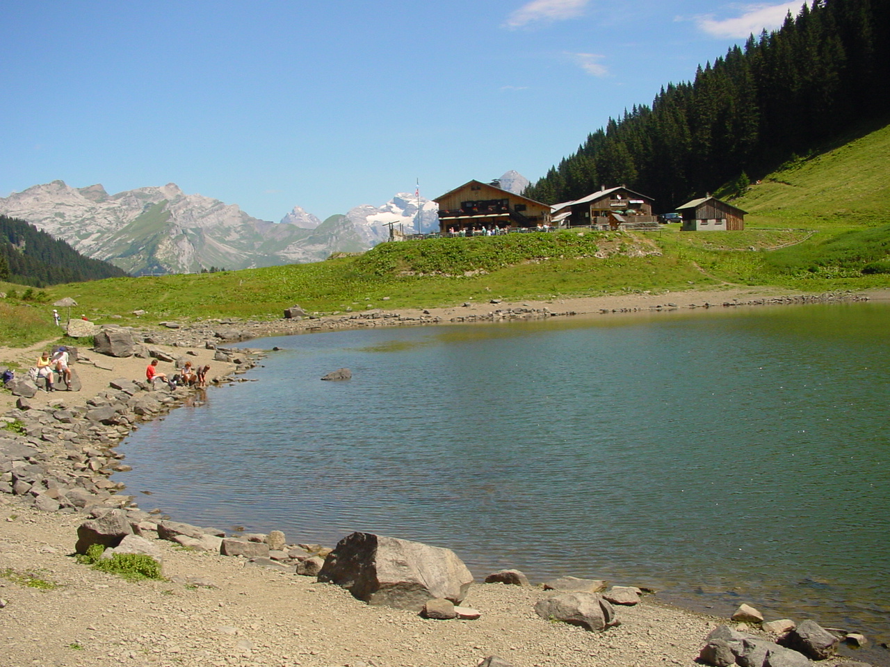 Lac de Gers (Haute-Savoie)